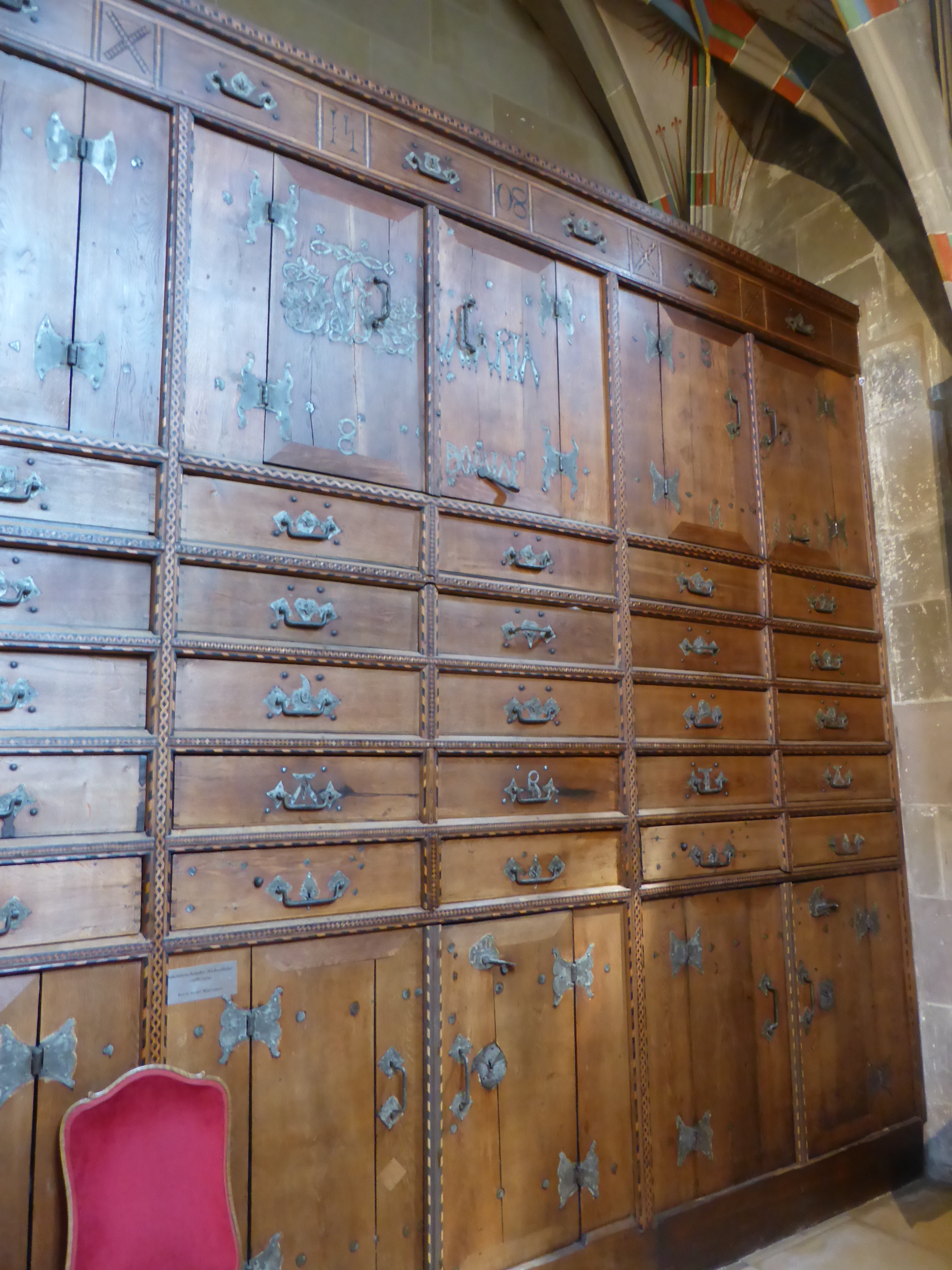 Sakristeischrank in St. Michael (Schwäbisch Hall), 1508/1509